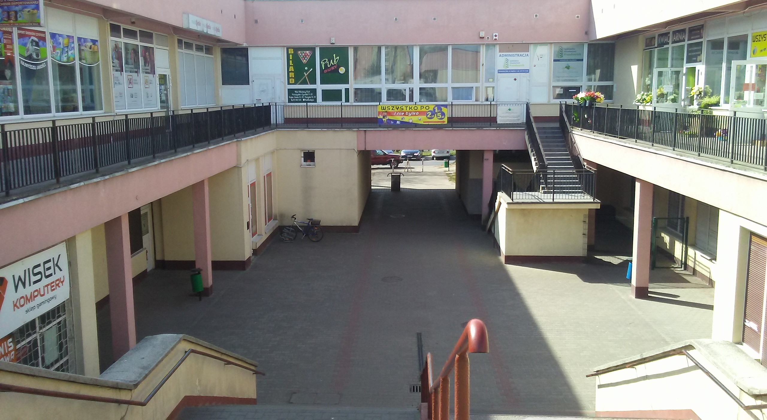 Centrum handlowo–usługowe „Skarpa” na największym osiedlu mieszkaniowym „Niebrów” w Tomaszowie Mazowieckim